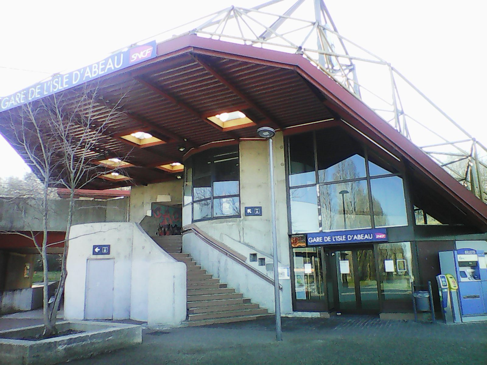 Gare SNCF de L'Isle d'Abeau en février 2019